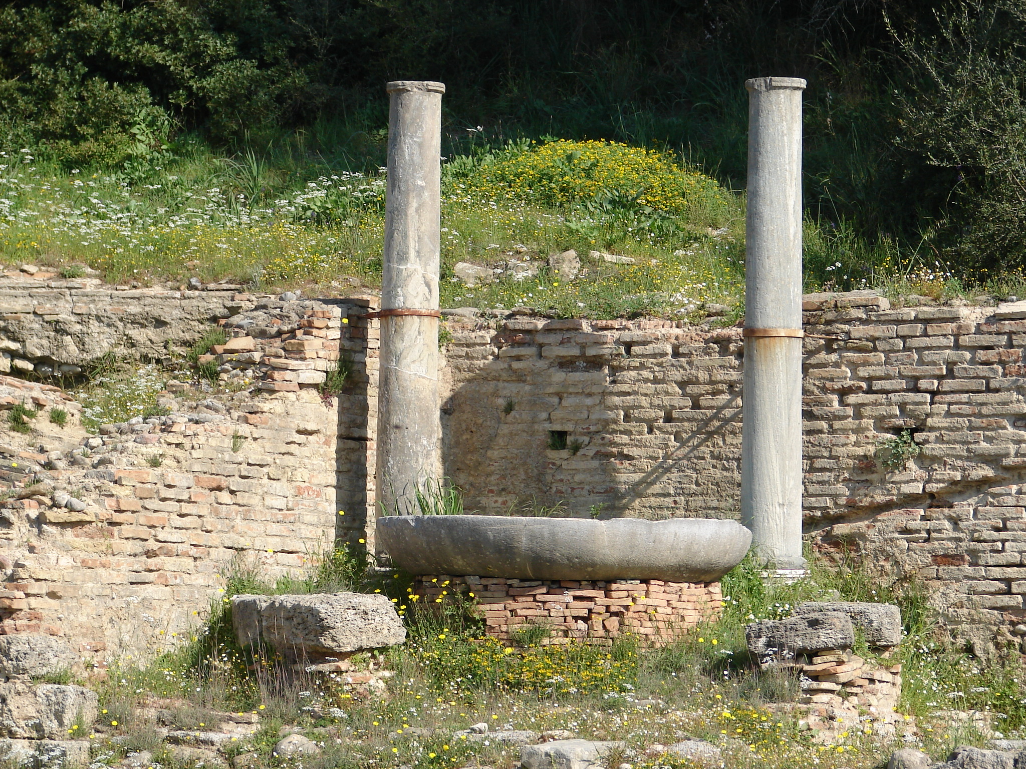 Bracere Olimpia Aprile 2006